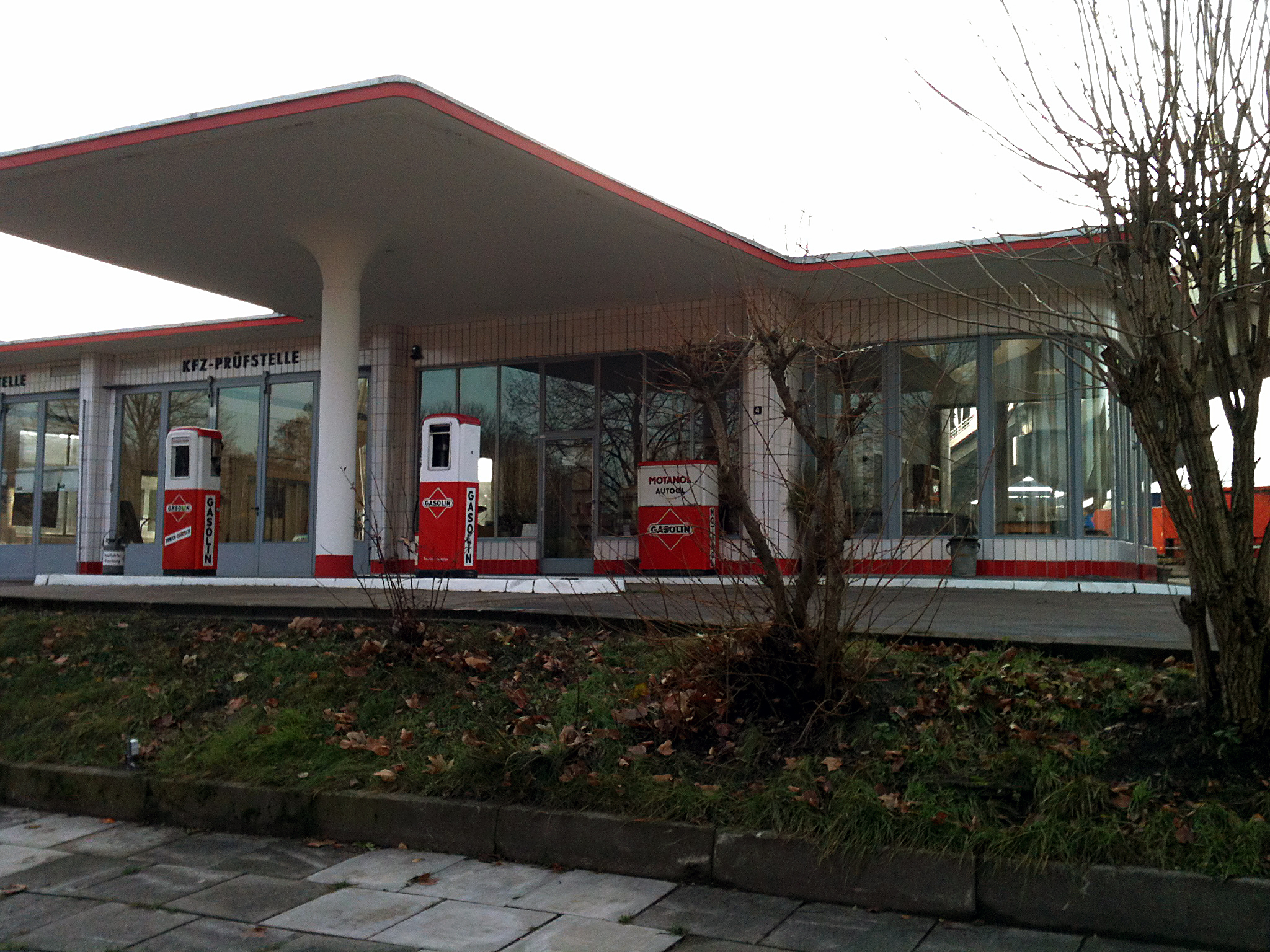 ehemalige Tankstelle, HH-Rothenburgsort, Billhorner Röhrendamm 4 This is a photograph of an architectural monument.